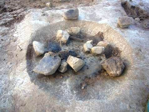 Peaugres détail